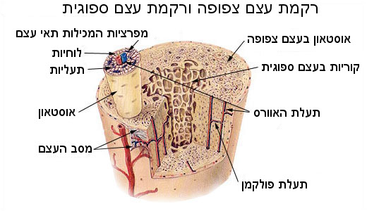 רקמת עצם צפופה ורקמת עצם ספוגית